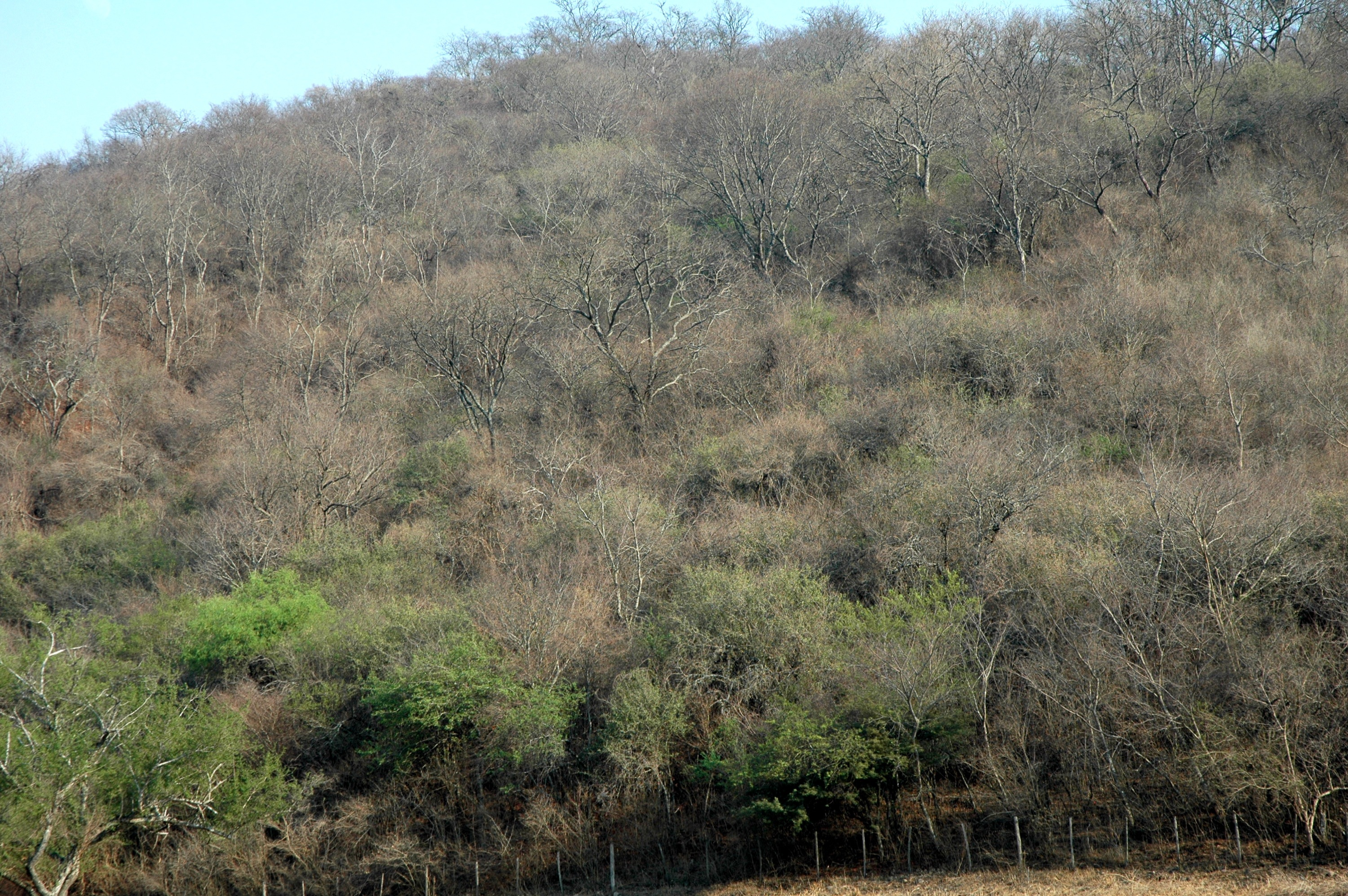 Ліс у горах Чако біля міста Сальта, Аргентина.